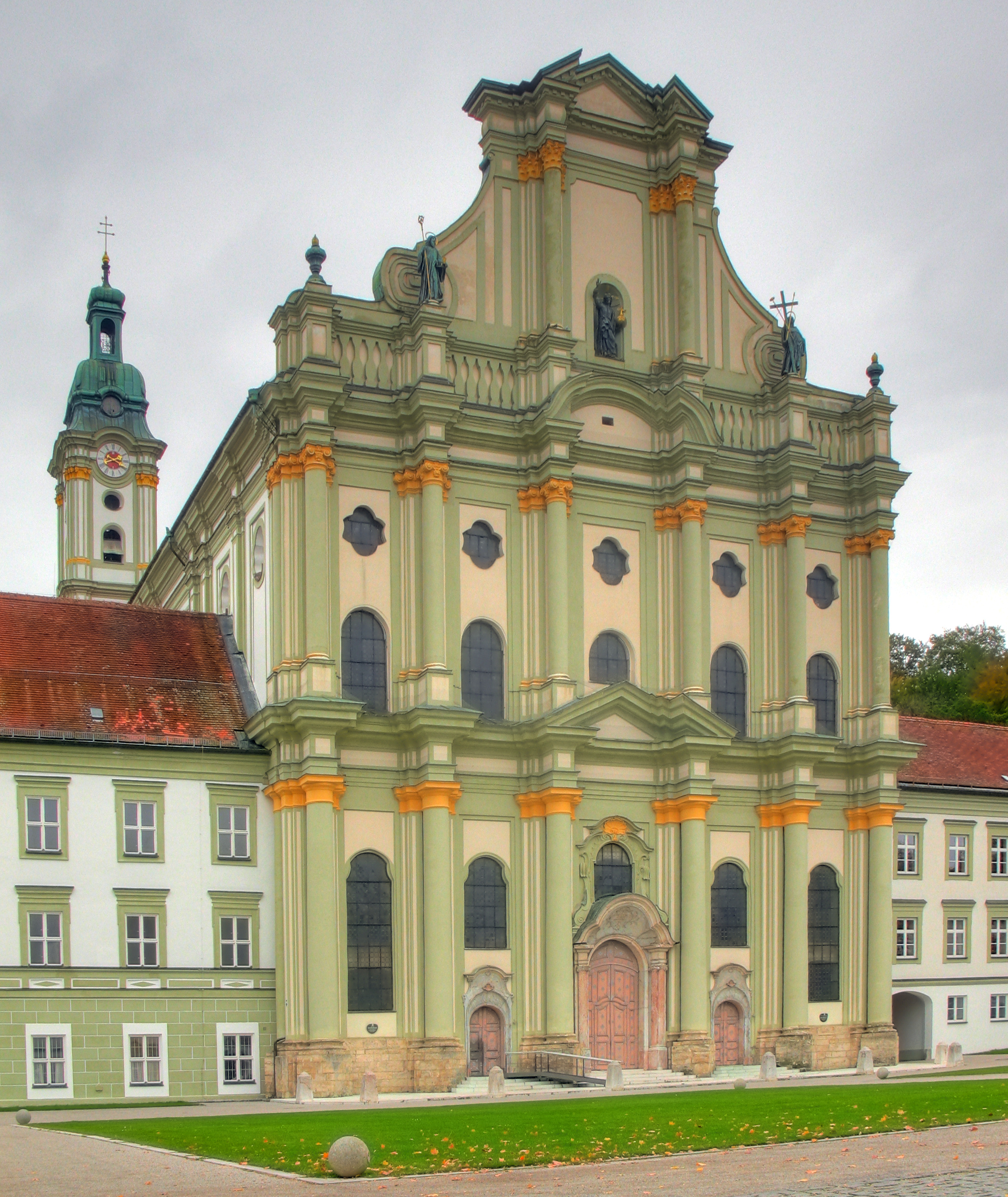 Deutschland, Bayern, Fürstenfeldbruck, Kloster Fürstenfeld, Kirche St. Mariä Himmelfahrt